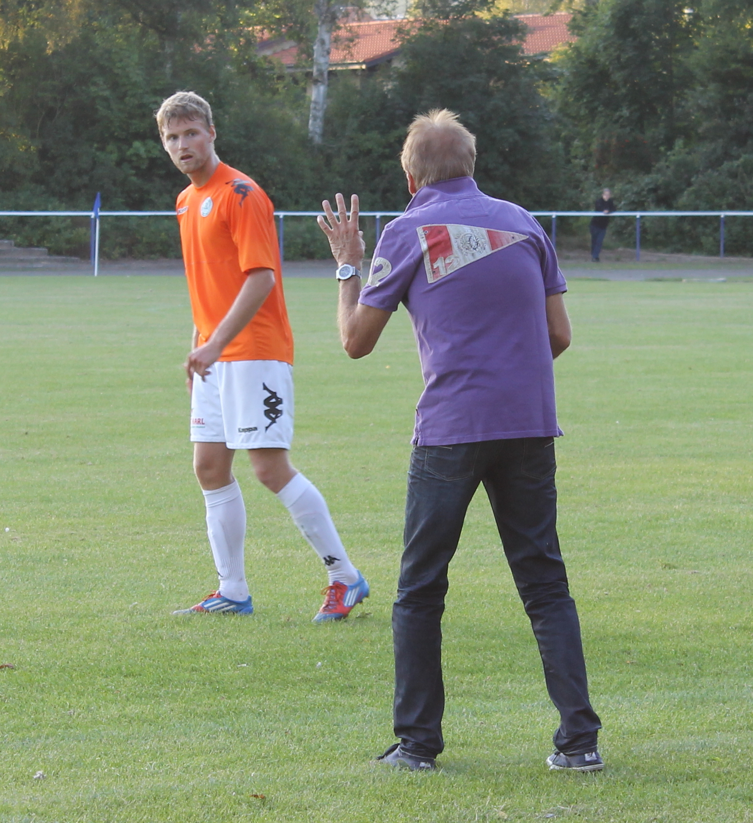 Kasper Stiller og fodboldtræner Ove Christensen på Odder Stadion 15. august 2012